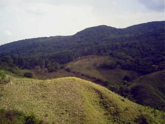 Reserva Forestal El Montuoso, Las Minas, Herrera